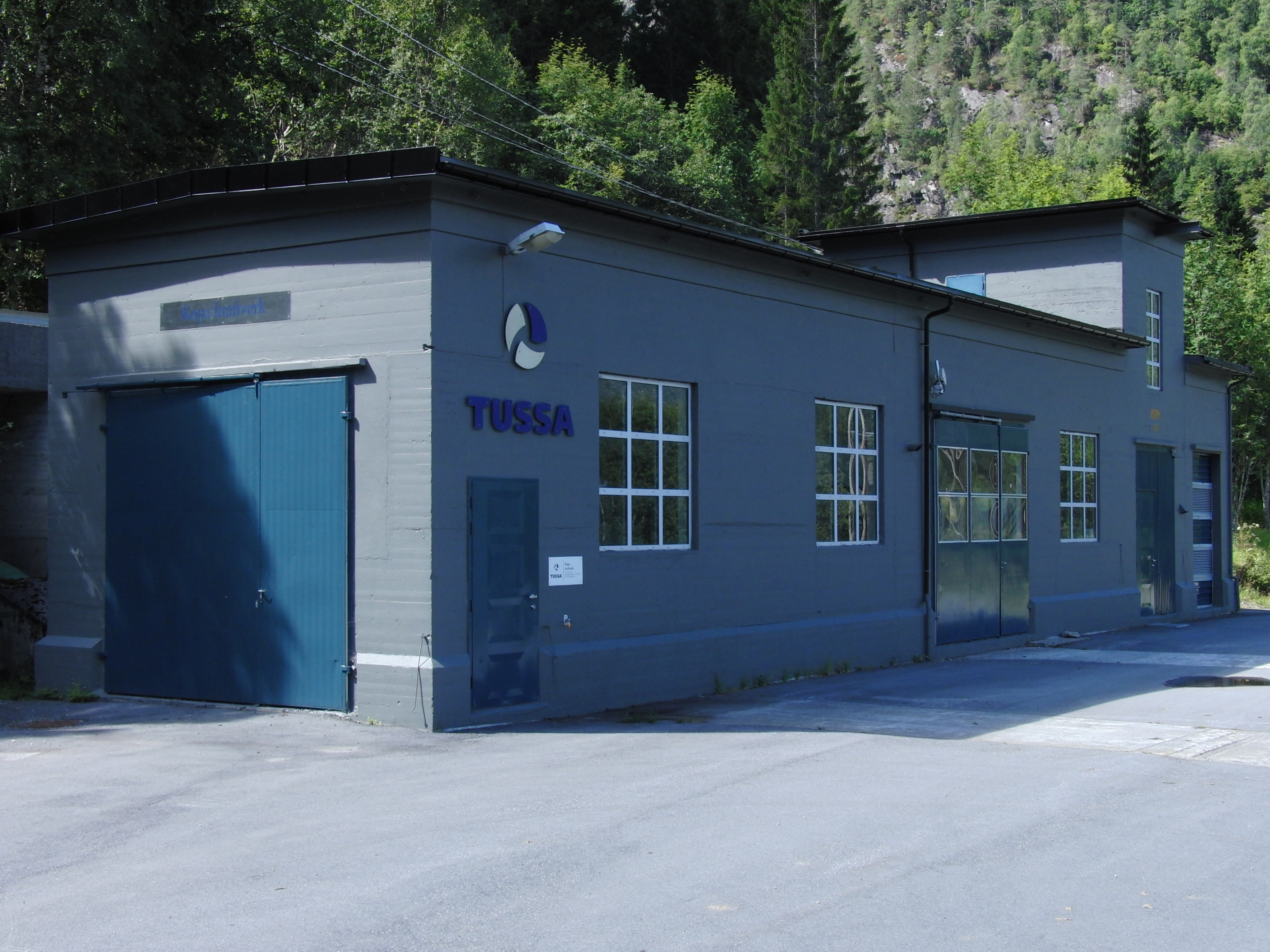 Kopa kraftverk